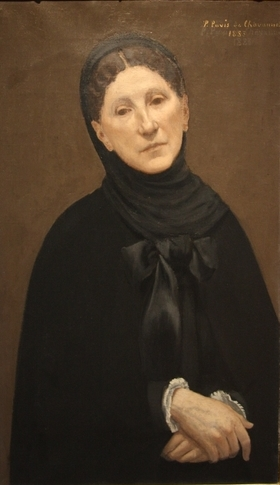 Marie Cantacuzène, femme de Puvis de Chavanne, par l'artiste